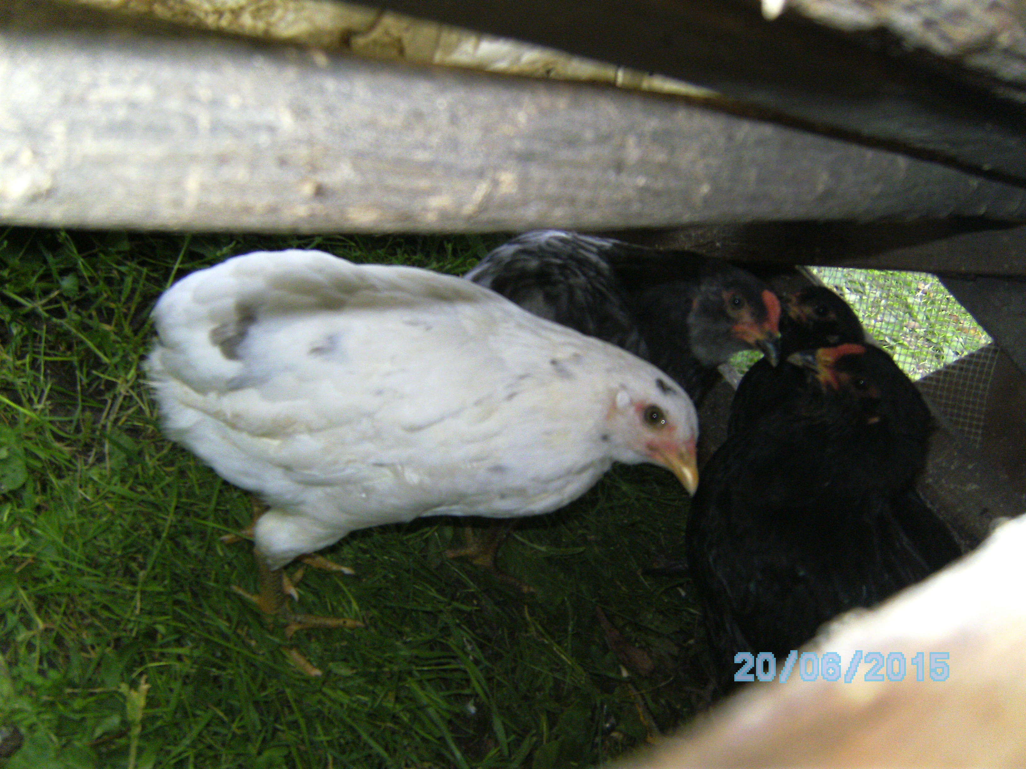 Młode araukany w klatce